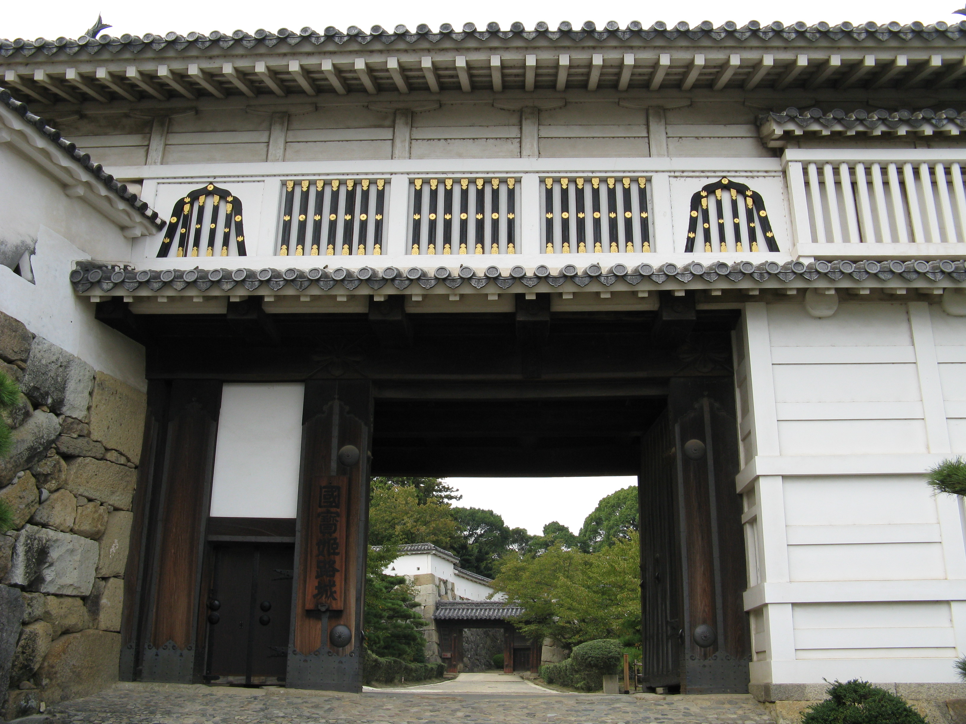 姫路城 菱ノ門